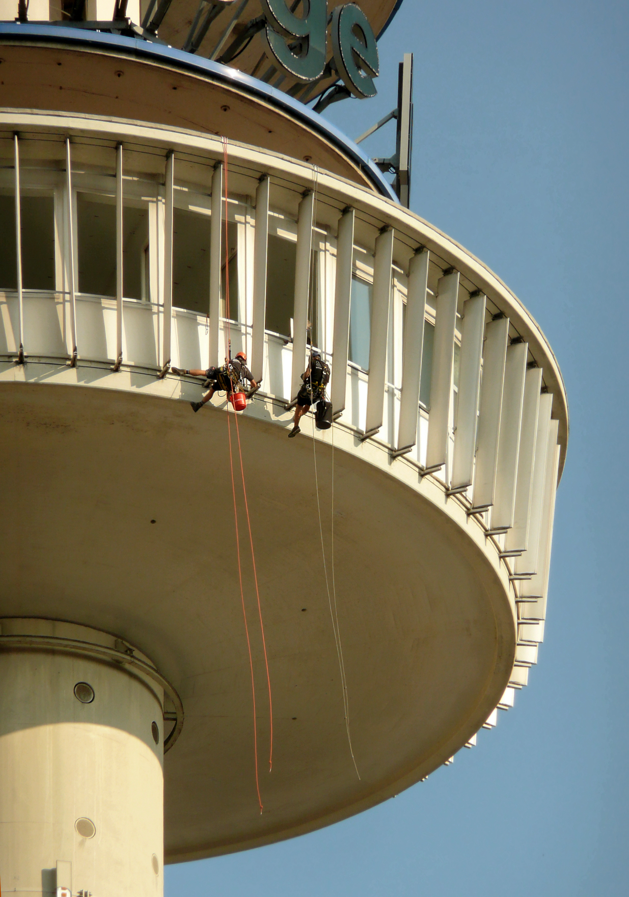 VW Tower Hannover Reparatur nach Steinschlag